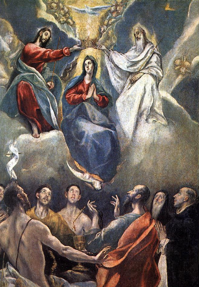 La obra muestra a los tres miembros de la Santísima Trinidad coronando a la Virgen María, madre de Jesucristo.